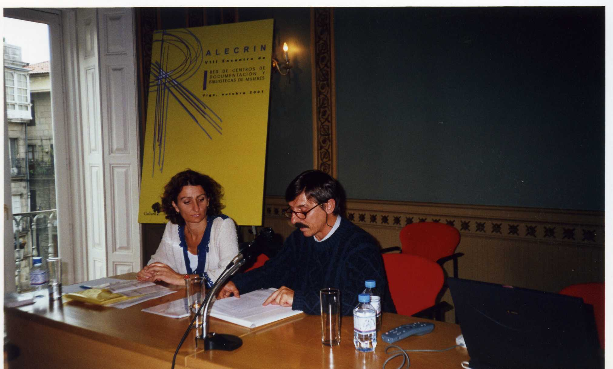 VIII Centros de Documentación e Bibliotecas de Mulleres ((Vigo, 2001) (2)